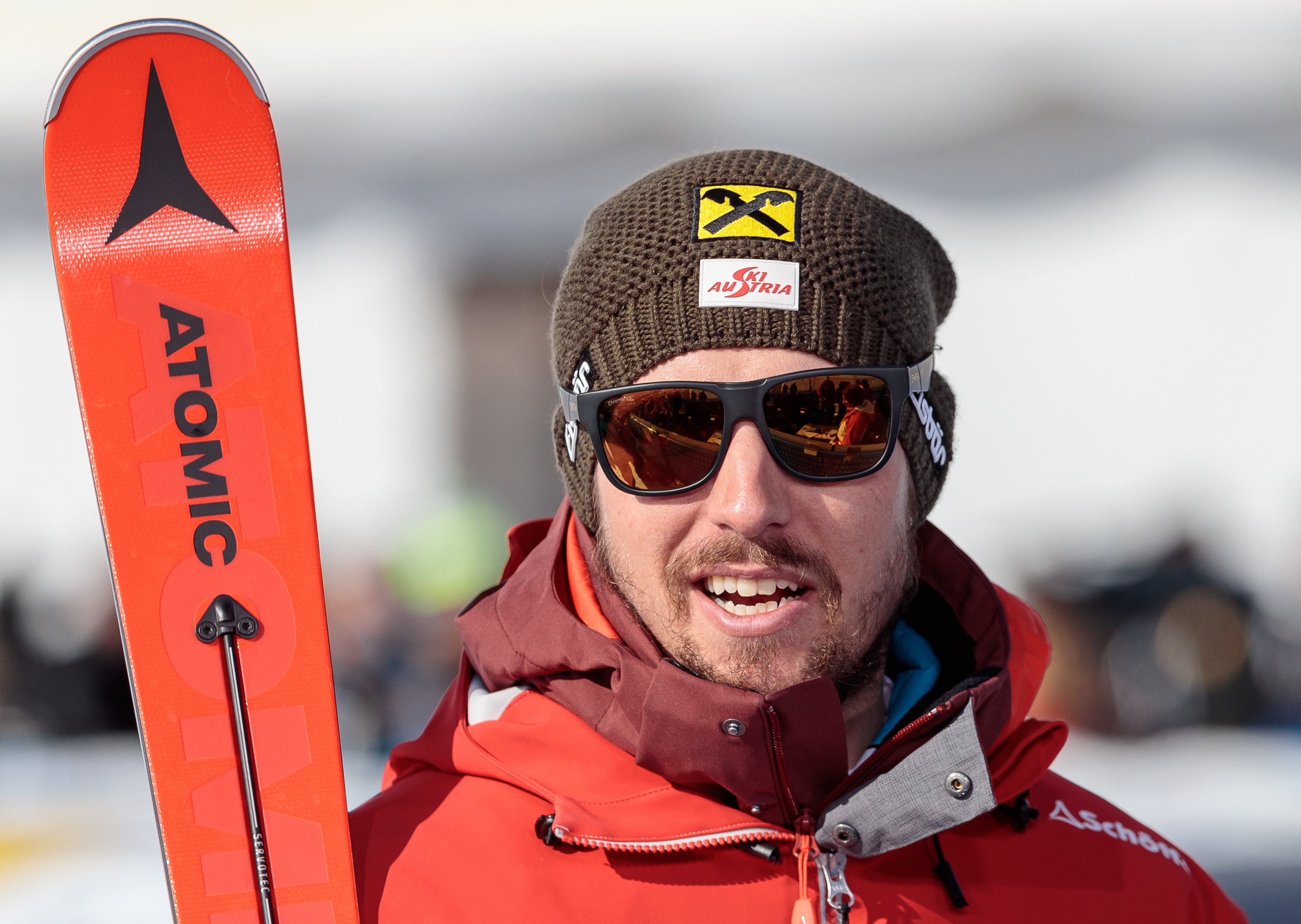 FIS Alpine World Championship 2017 St. Moritz, man, Marcel Hirscher